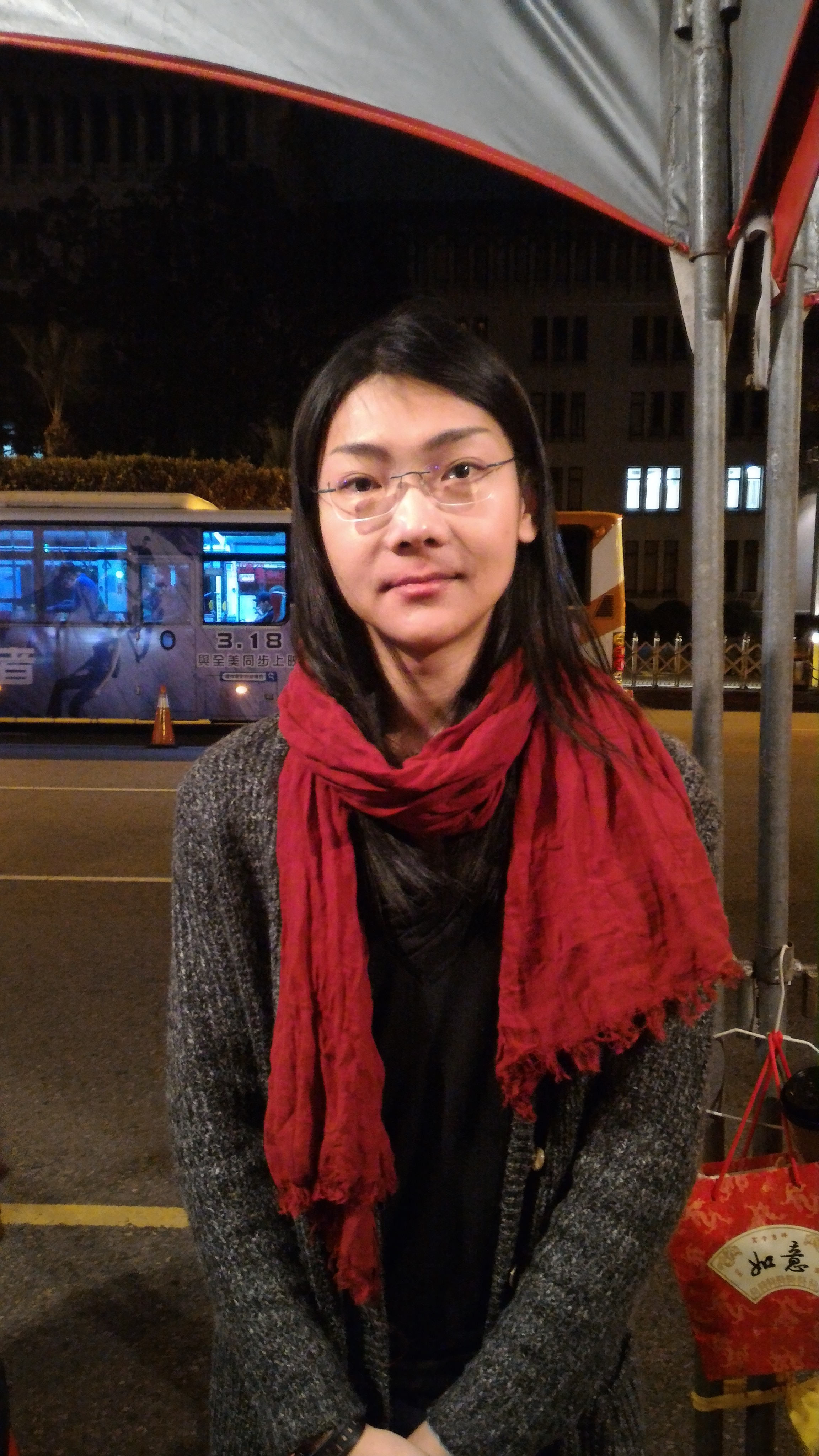 葉繼元，原內政部警政署保安警察第二總隊第二大隊男警員，因蓄髮而受懲處。